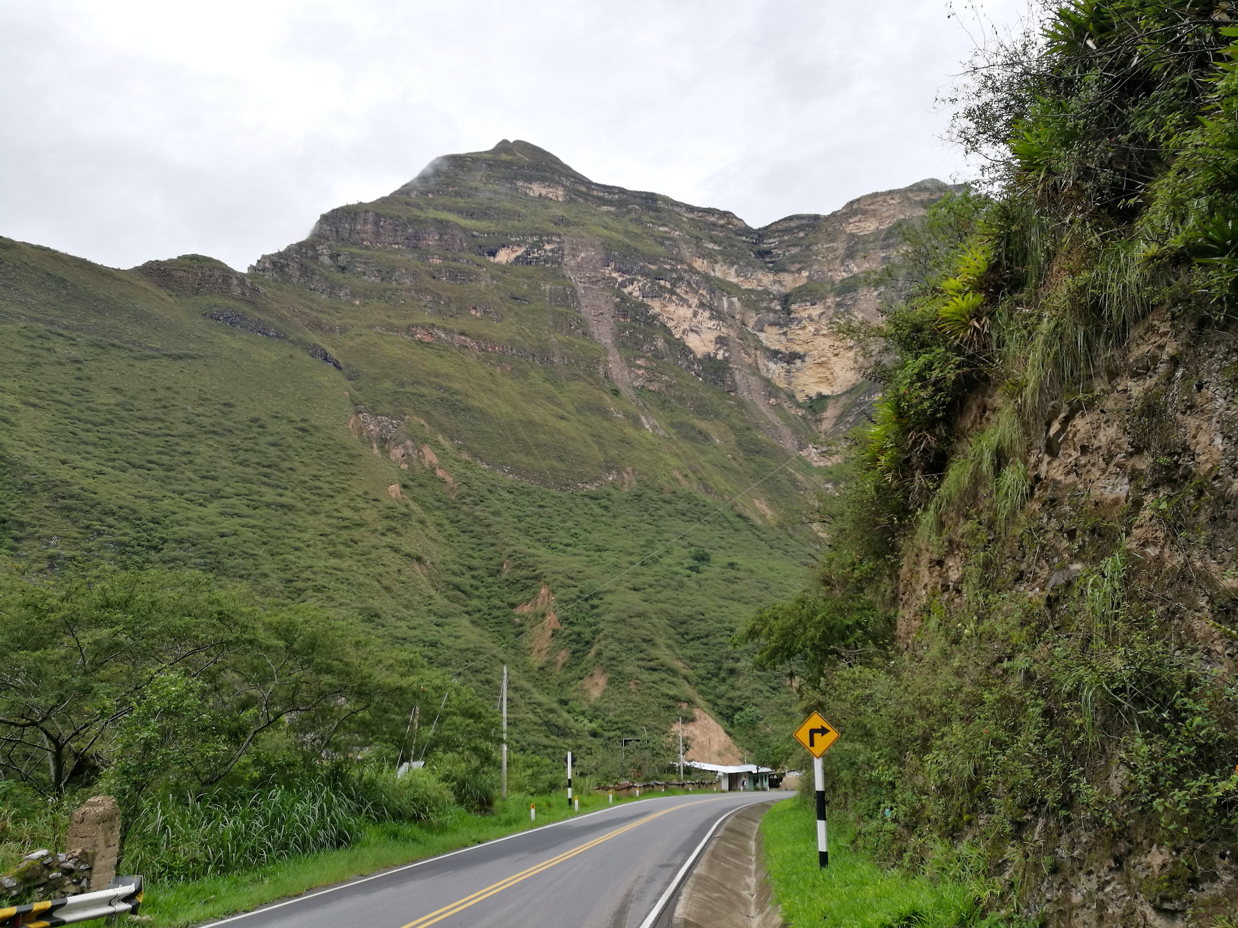 Carretera direcció a Pedro Ruiz en el trencant que va a San Pedro de Valera